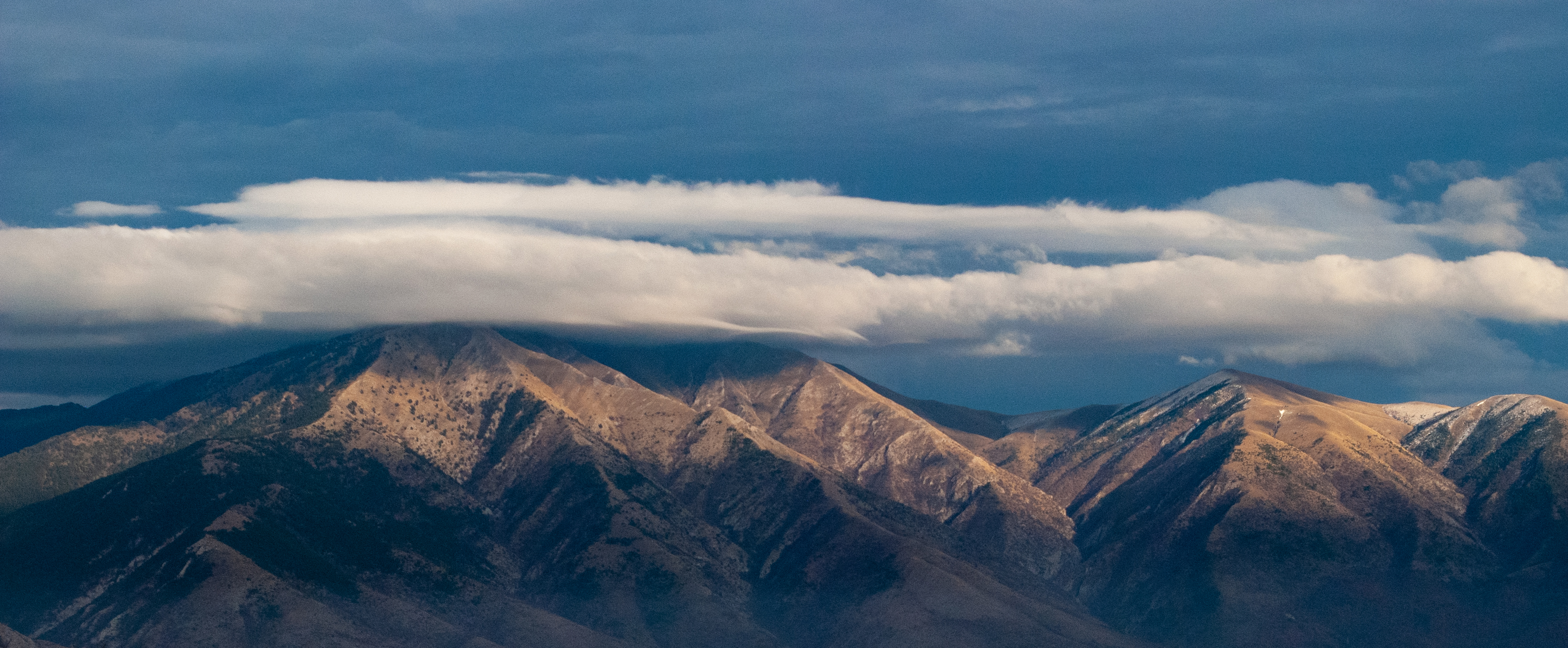 Планината Али Ботуш, гледана от Гърция (юг)